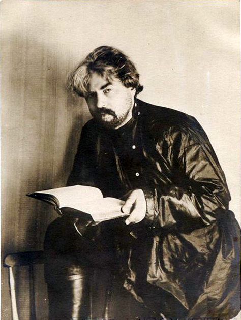 Григорий Петров: «Будьте строителями жизни!» (вскоре после лишения сана). Журнал "Родина"